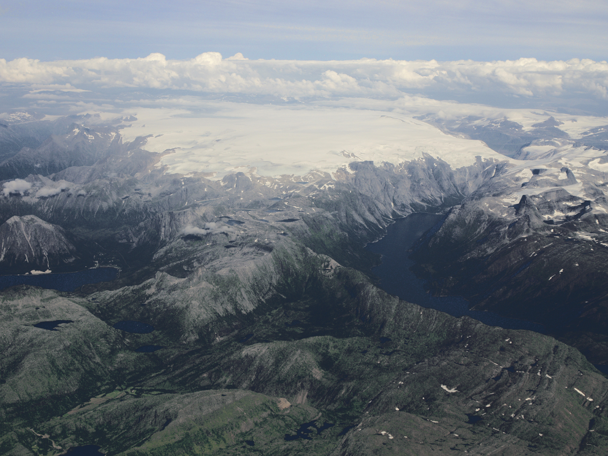 Svartisen im Nachmittagslicht von Westen, rechts der Nordfjord